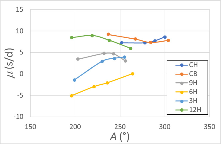 Marche en seconde par jour d'une montre mécanique mesurée pour plusieurs armages du barillet (donc différentes amplitudes des oscillations) et ceci dans diverses orientations.